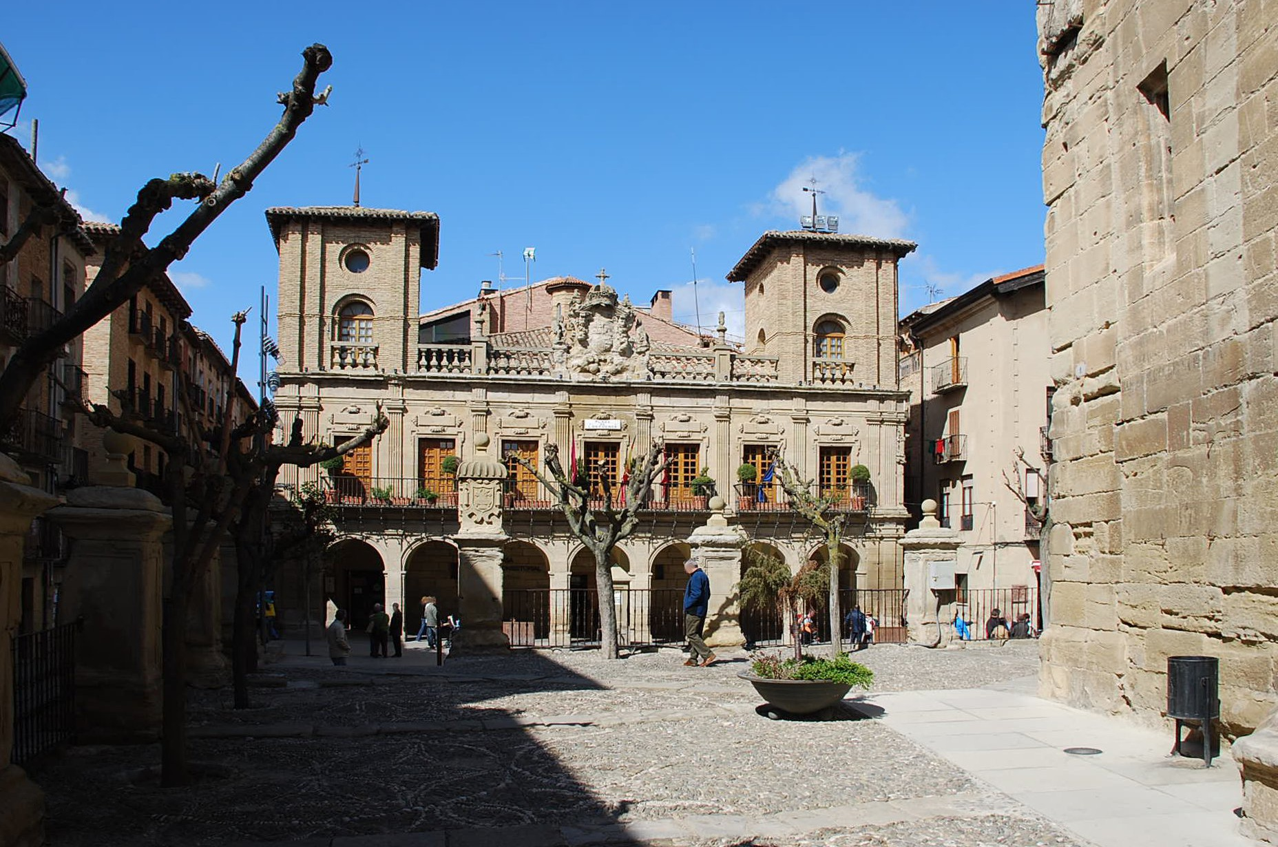 Centro histórico de Viana (Navarra - España)